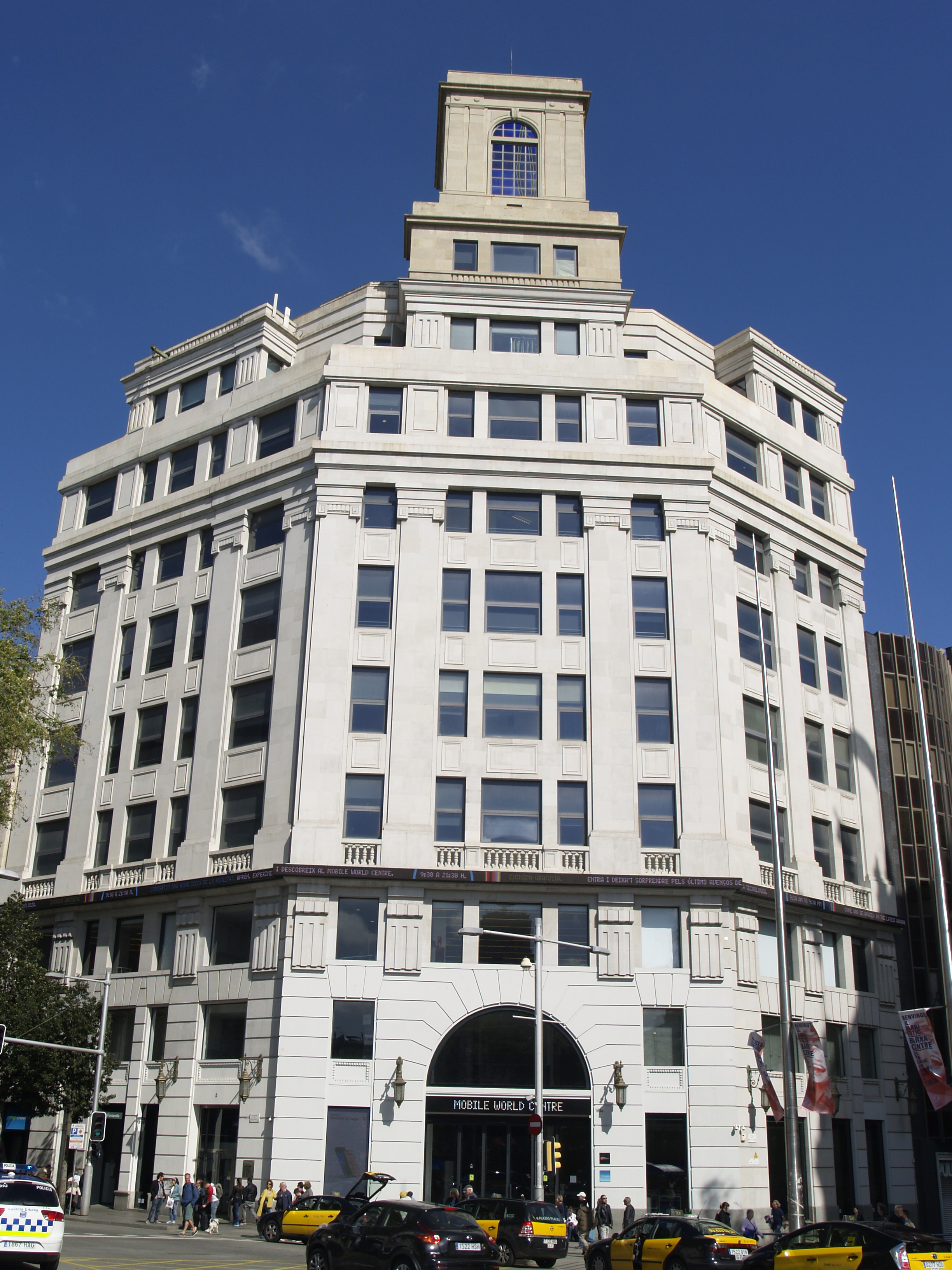 {nombre }